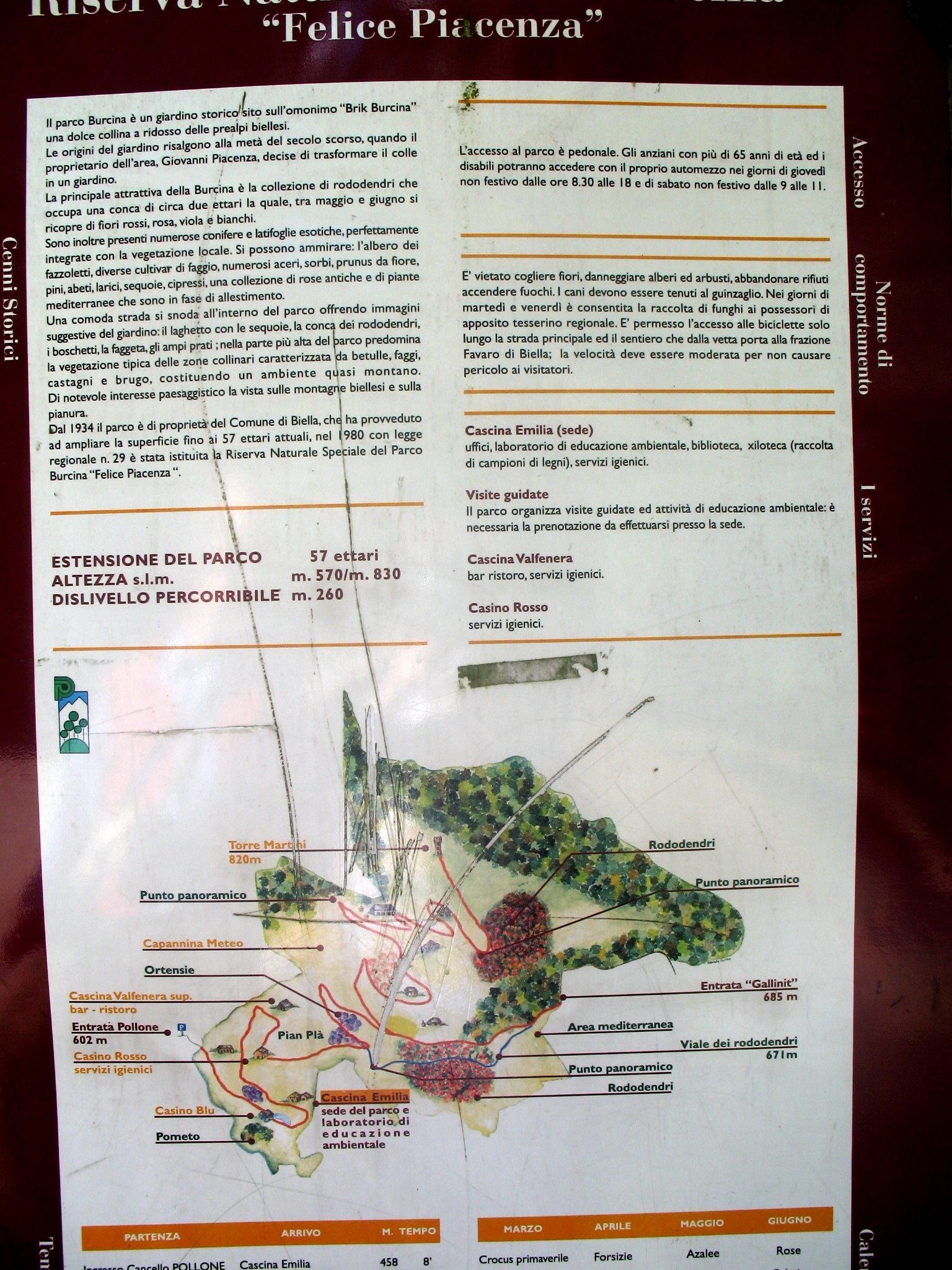 Parco della Burcina, Biella, Piemonte, Italia